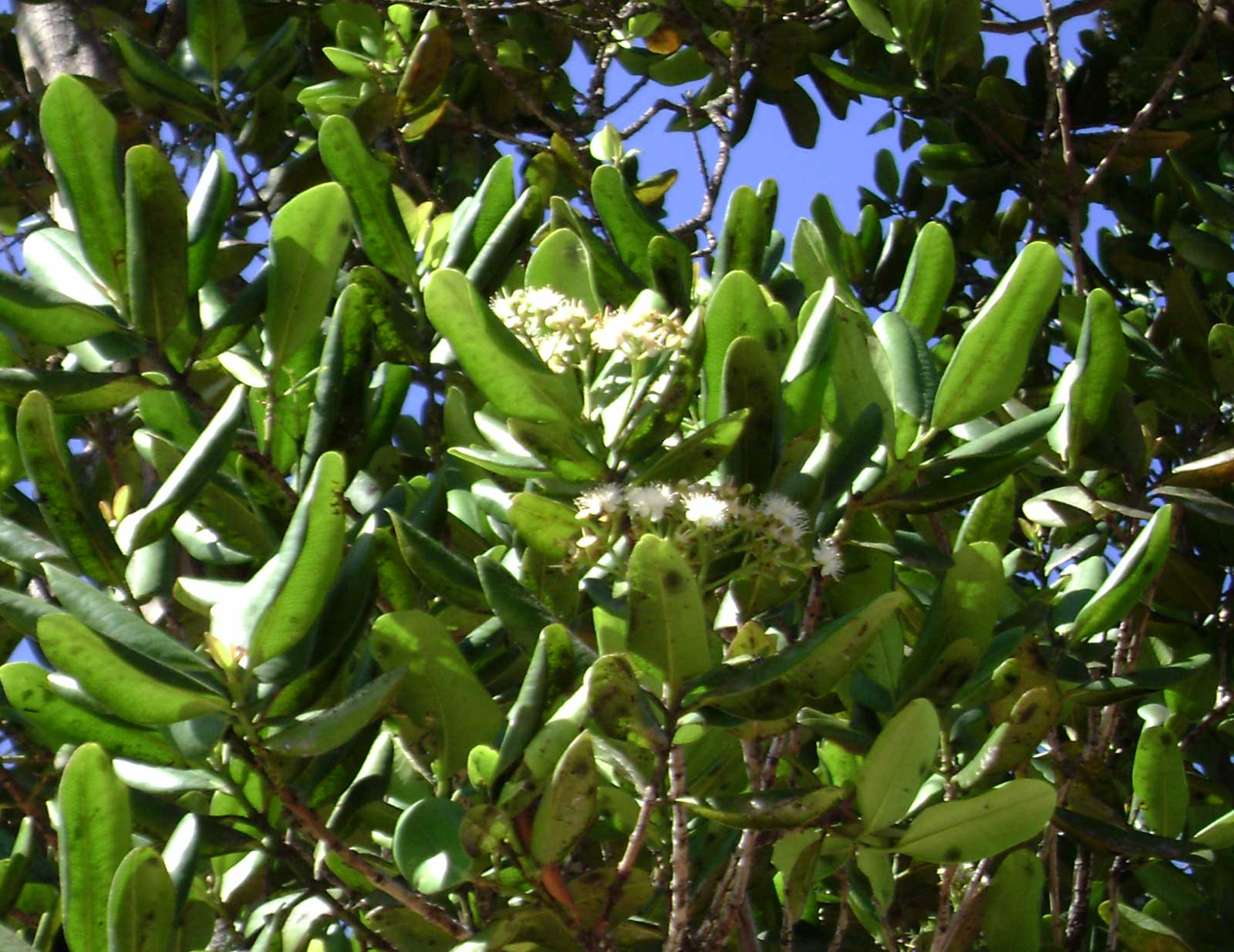 Pimenta racemosa, (sinamoni) in Tonga